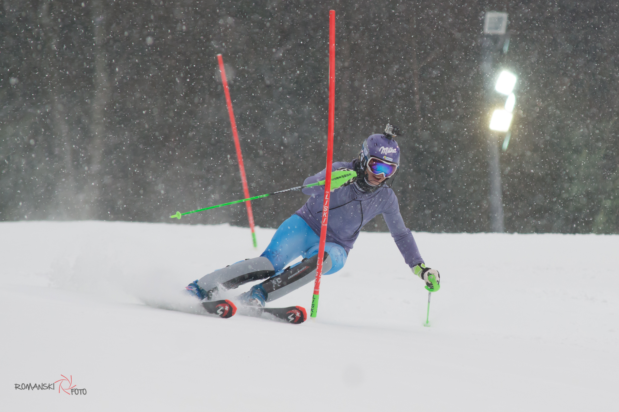 Tina Maze